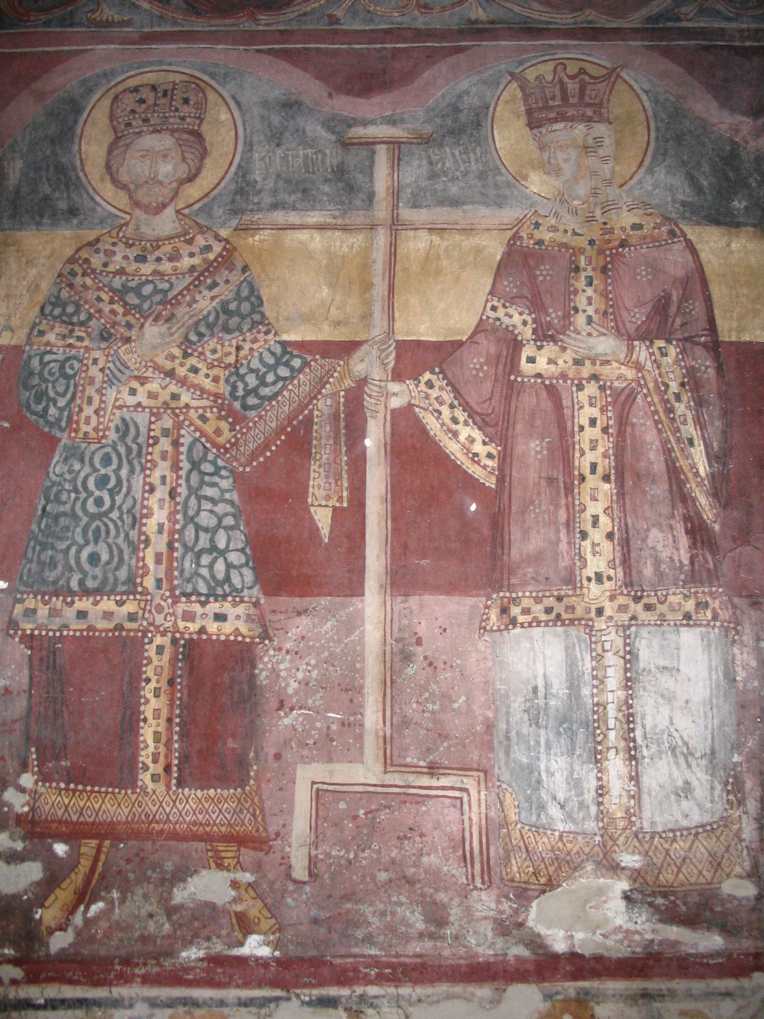 Фреска у манастиру Јежевица, Цар константин и царица Јелена.